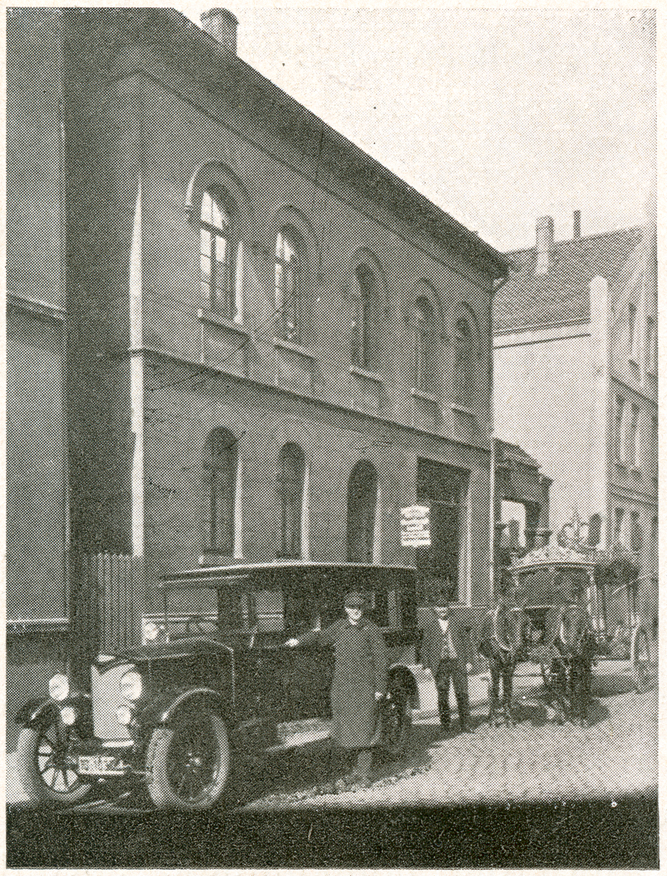 Punktgerasteter Druck einer um 1926 entstandenen Fotografie von Karl Friedrich Leonhardt mit einer Aufnahme des - heute denkmalgeschützten - Gebäudes Heisenstraße 24 in der Nordstadt von Hannover. Vor dem Gebäude posieren im Vordergrund der Fahrer des ersten Autobiles, dahinter der Kutscher mit zwei Pferden und einer Luxus-Kutsche des am 3. Januar 1873 gegründeten Unternehmens „Friedrich Husmann. Luxusfuhr- und Beerdigungswesen. Autobetrieb“ ...